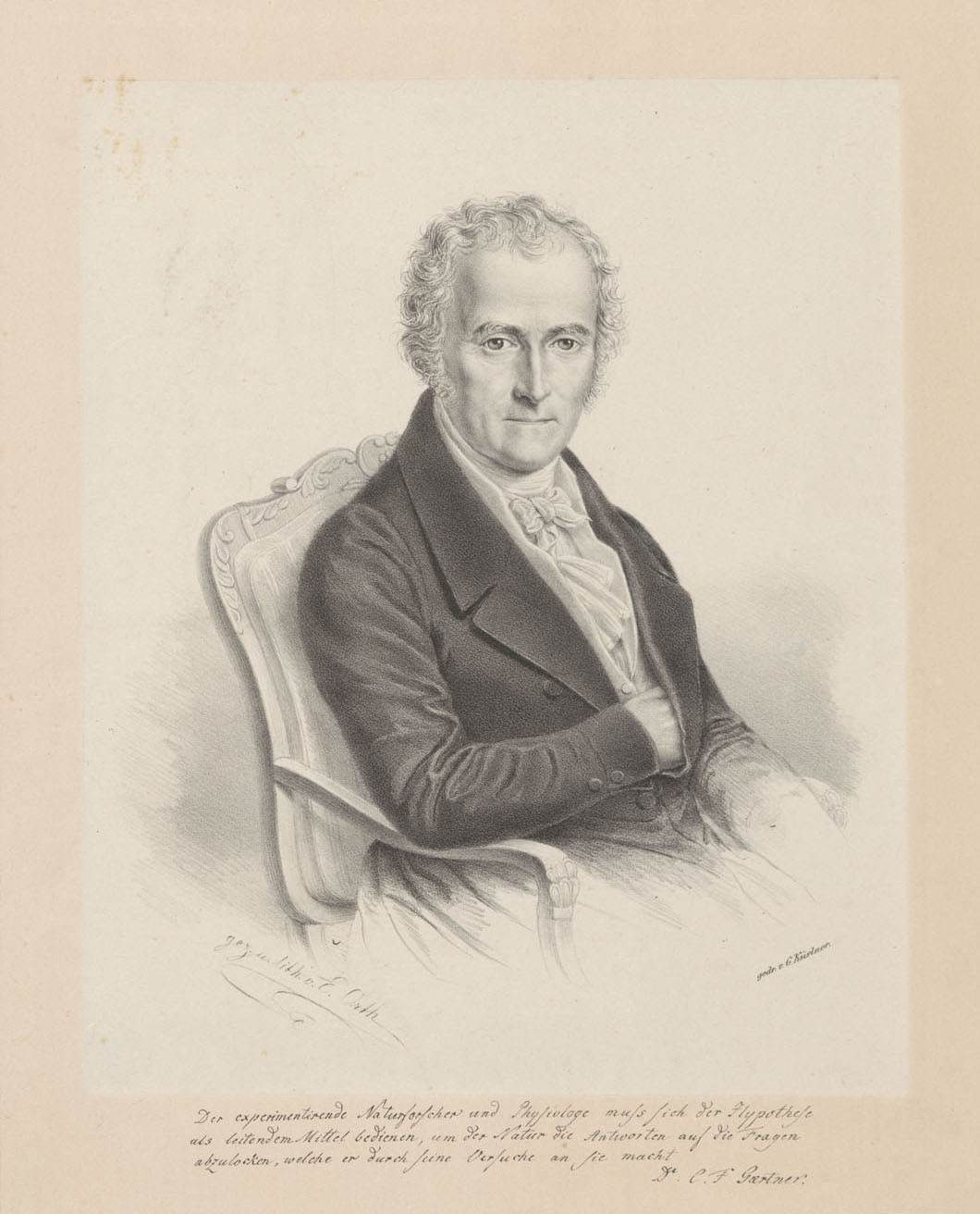 Der Botaniker und Arzt Karl Friedrich von Gärtner (1772–1850). Lithographie